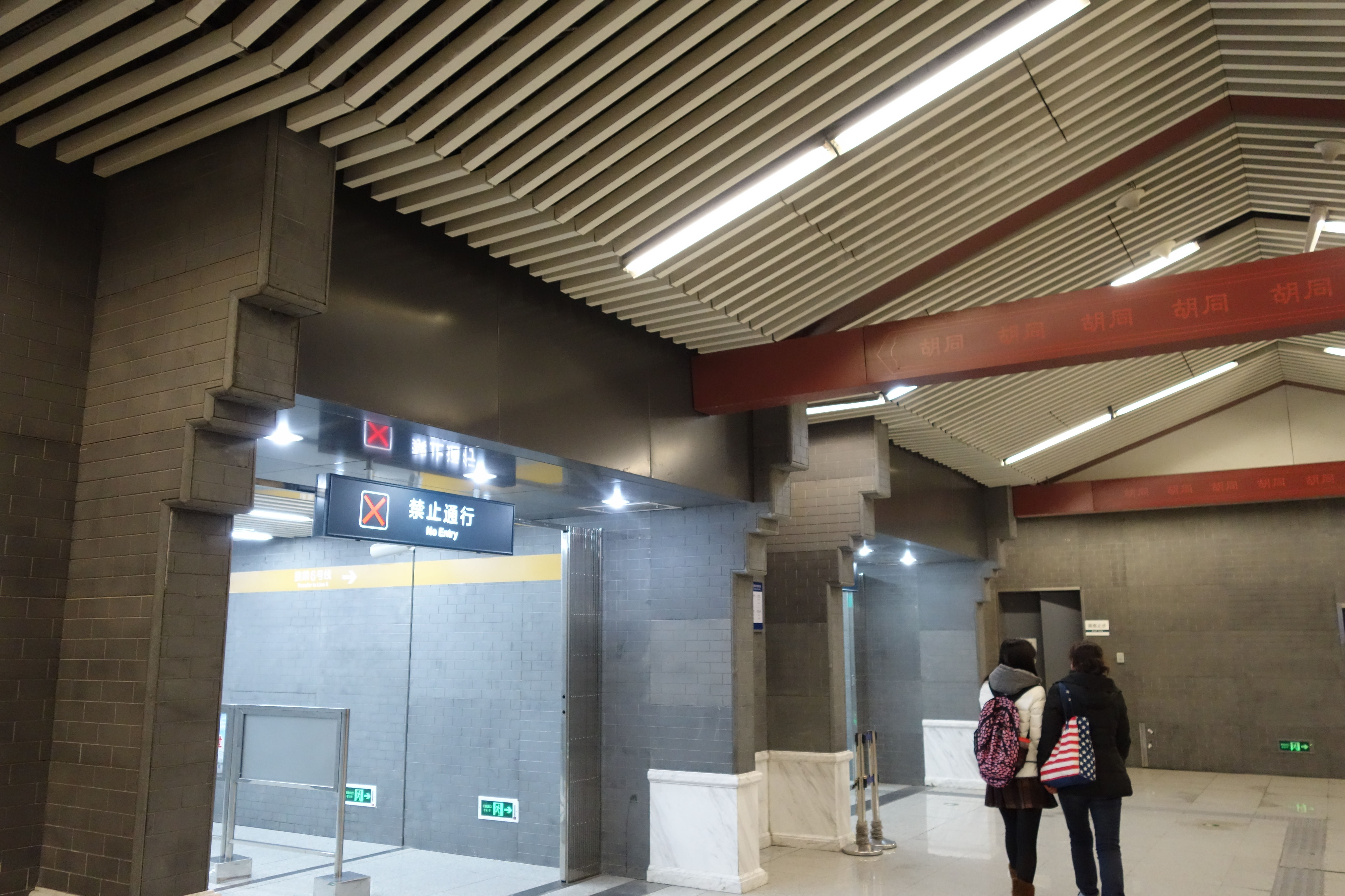 南锣鼓巷6号线站台换乘8号线通道